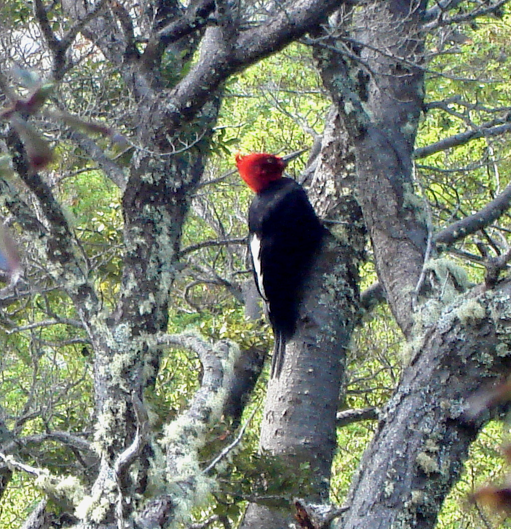 Male.